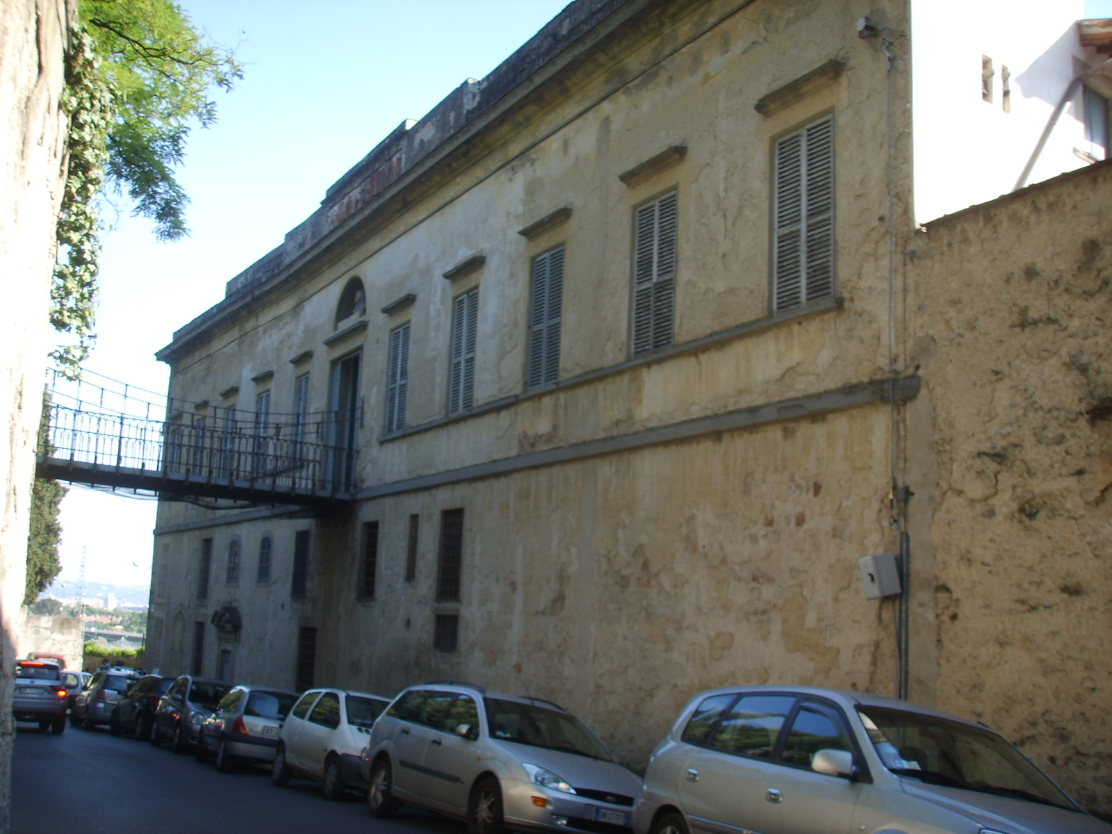 Villa paolina di sesto